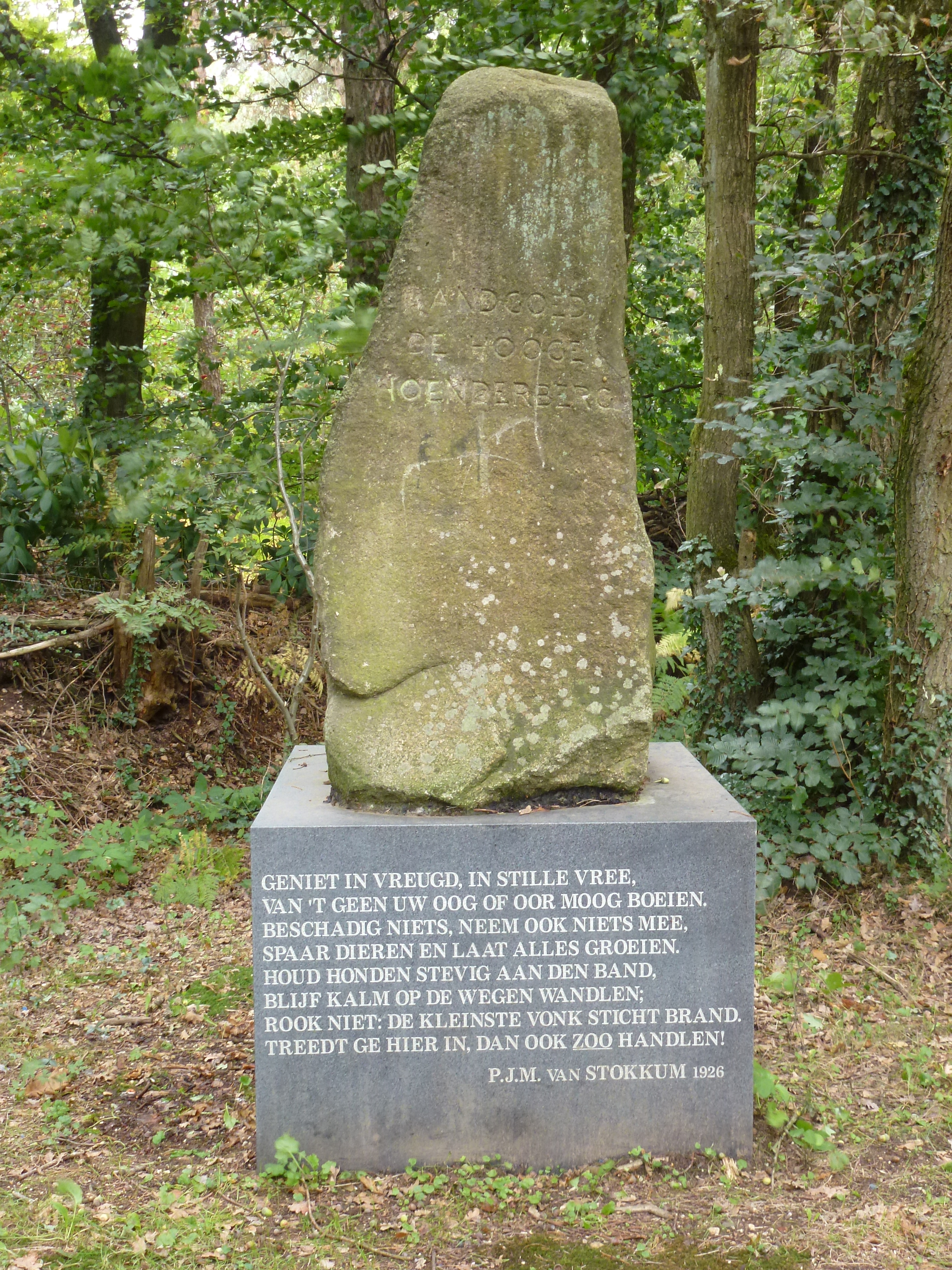 Groesbeek (NL) Bisseltsebaan 30, de steen met sokkel